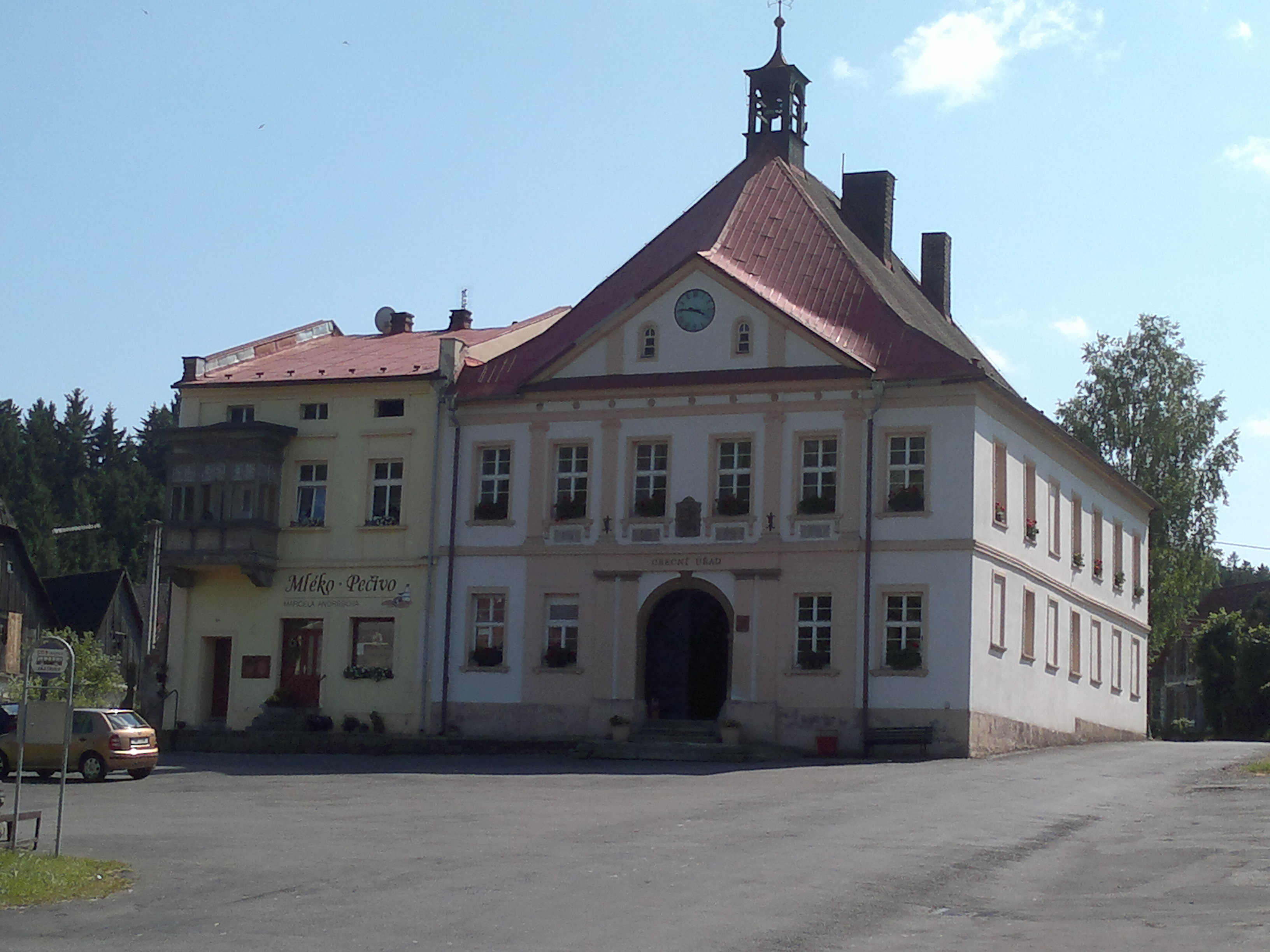 Radnice Stárkov, Česká republika